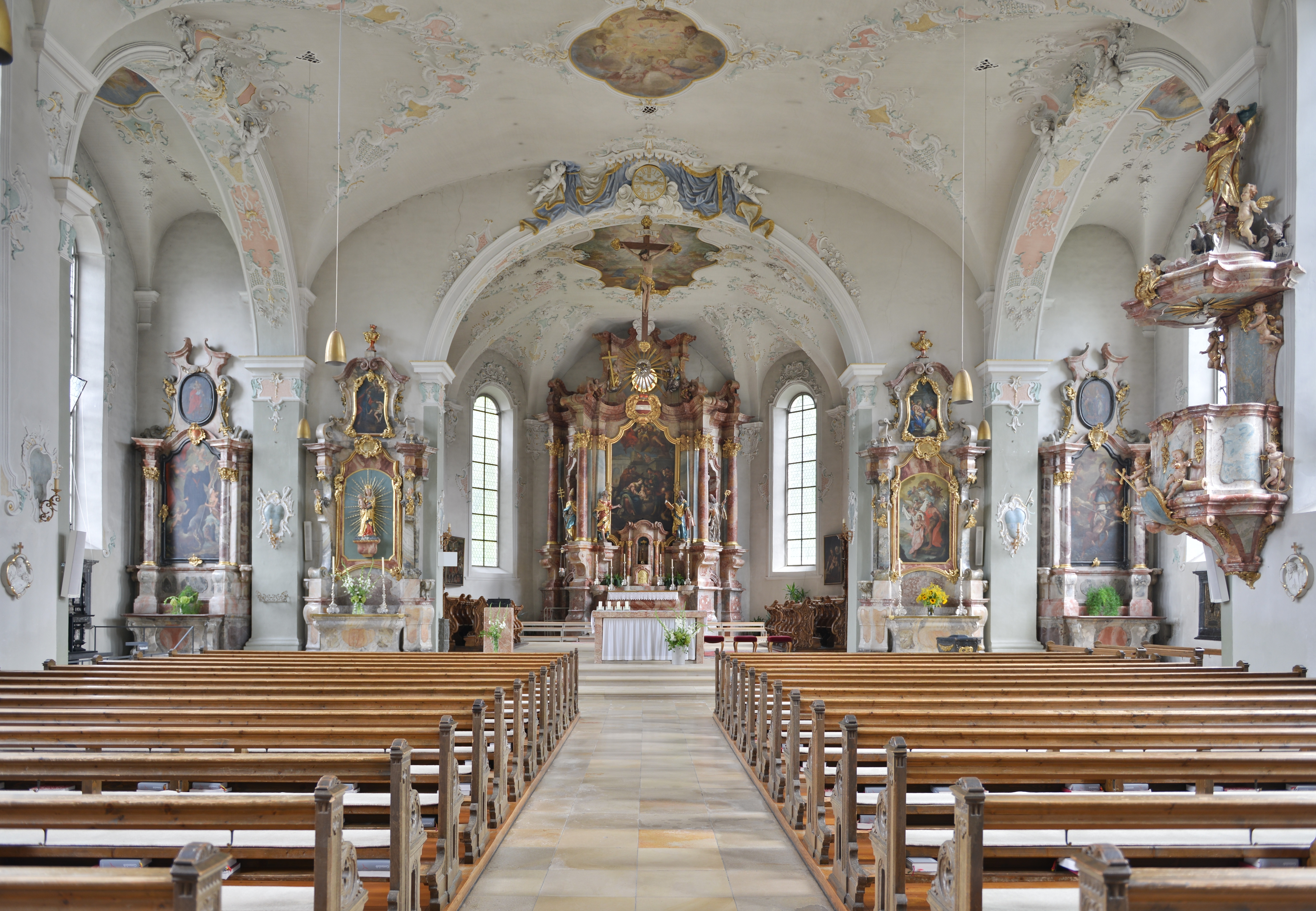 Innenraum der Stadtpfarrkirche St. Gallus in der Oberstadt von Bregenz.